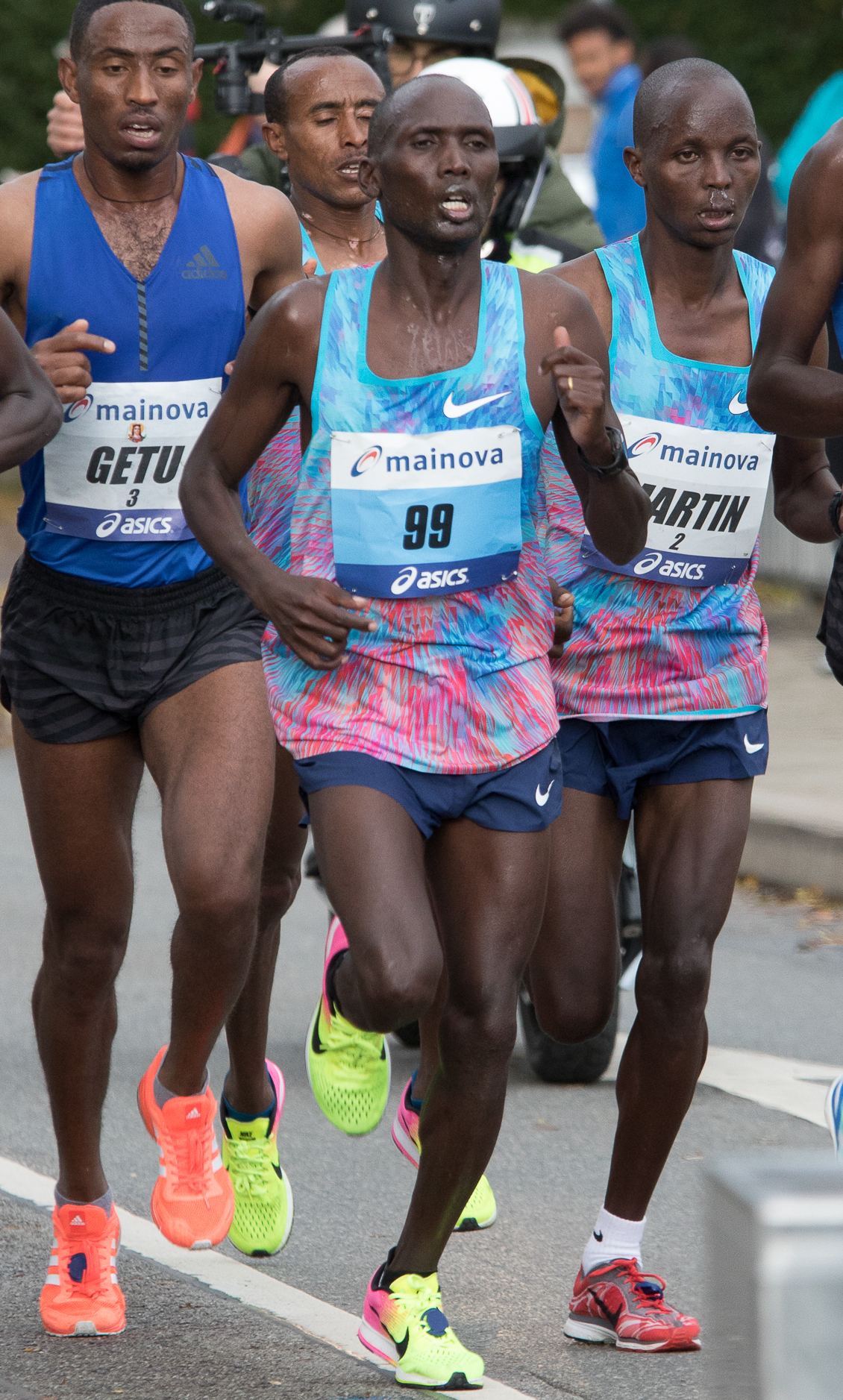 Martin Kiprugut Kosgey, Getu Feleke Zegeye, Vincent Kipsegechi Yator (99), Frankfurt Marathon 2017